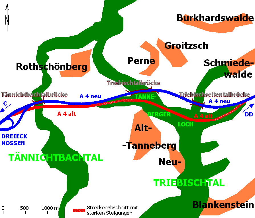 Provisorische Karte des Tanneberger Lochs und der Trassenverlegung Triebischtäler, Gemeinde Triebischtal, Landkreis Meißen, Freistaat Sachsen, Bundesrepublik Deutschland